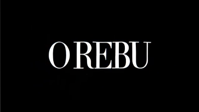 Logotipo da telenovela brasileira O Rebu, produzida pela Rede Globo em 2014